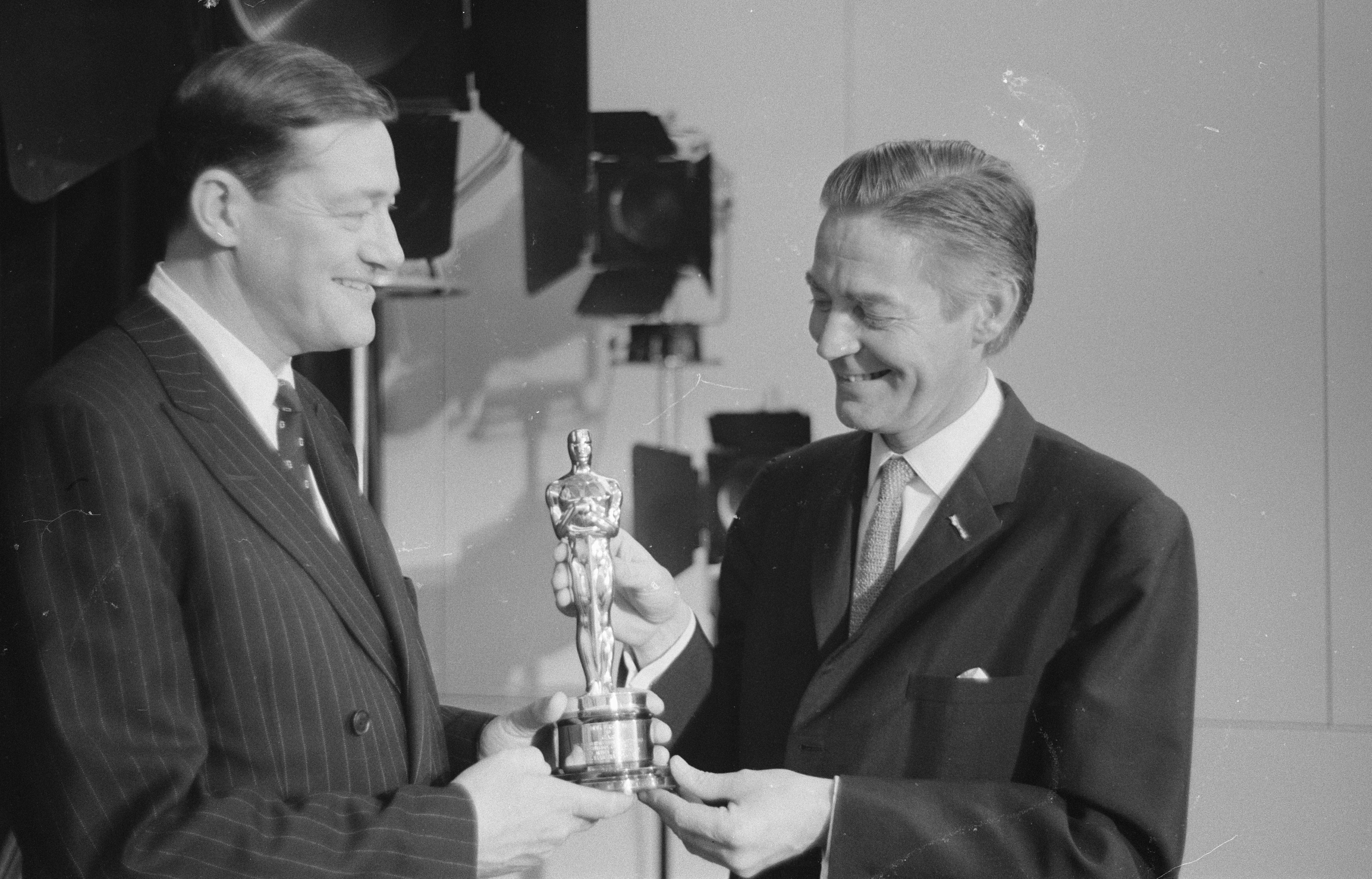 Collectie / Archief : Fotocollectie Anefo Reportage / Serie : [ onbekend ] Beschrijving : Uitreiking "Oscar" aan Bert Haanstra door Amerikaanse ambassadeur Ph. Young Datum : 16 juni 1960 Trefwoorden : Uitreikingen, ambassadeurs Persoonsnaam : Haanstra, Bert, Young, Ph. Fotograaf : Pot, Harry / Anefo Auteursrechthebbende : Nationaal Archief Materiaalsoort : Negatief (zwart/wit) Nummer archiefinventaris : bekijk toegang 2.24.01.05 Bestanddeelnummer : 911-3434 Reacties Geplaatst door Televisiefan op 30 juli 2017 - 16:08. Locatie: Amerikaanse Ambassade Plaats: Den Haag, Zuid-Holland NB. Bert Haanstra kreeg de 'Oscar' voor de documentaire / film 'Glas'. Hij was de eerste Nederlander die een 'Oscar' in ontvangst mocht nemen.